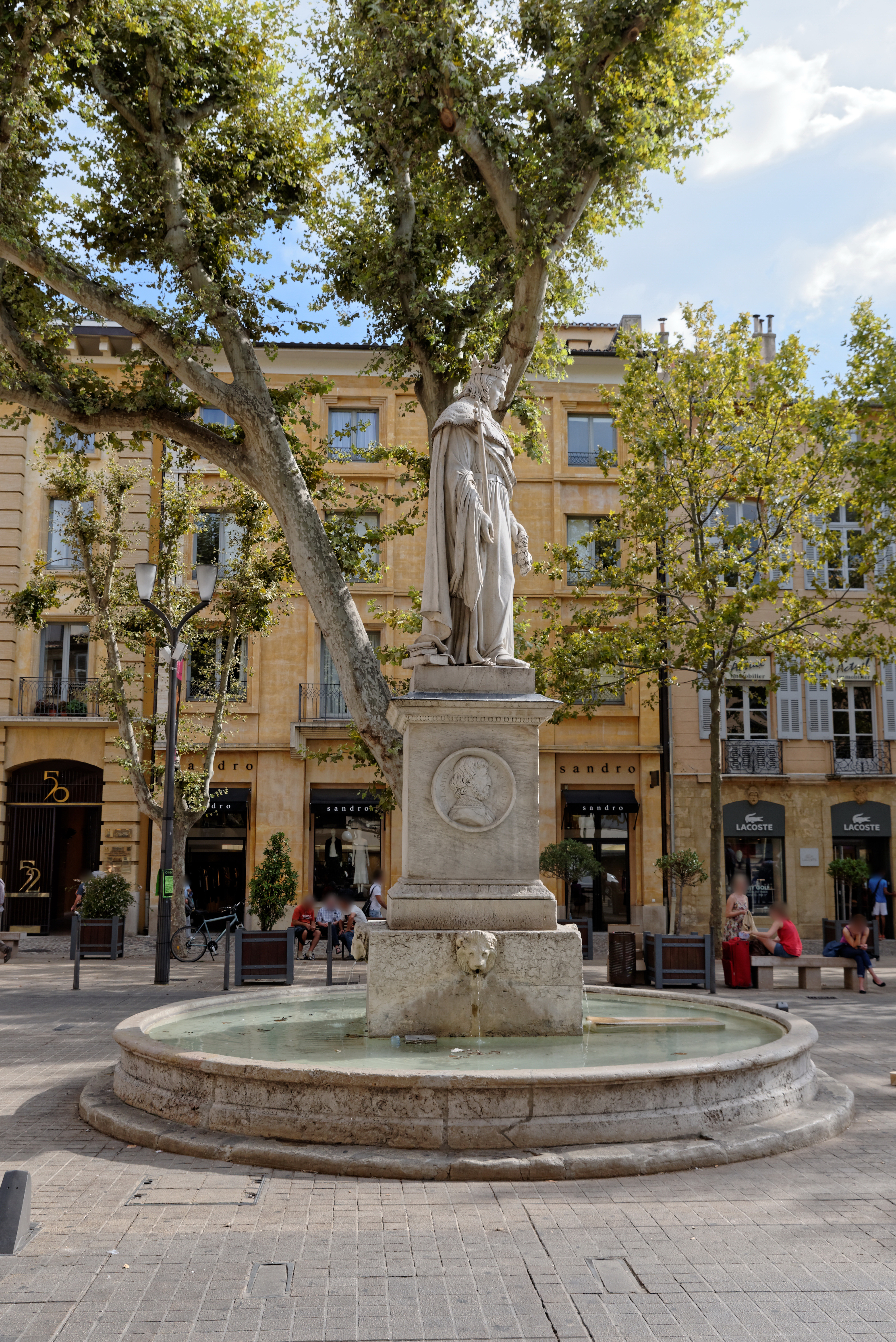 La statue du roi René 1er de Naples et sa fontaine à Aix en Provence (Bouches-du-Rhône, France).